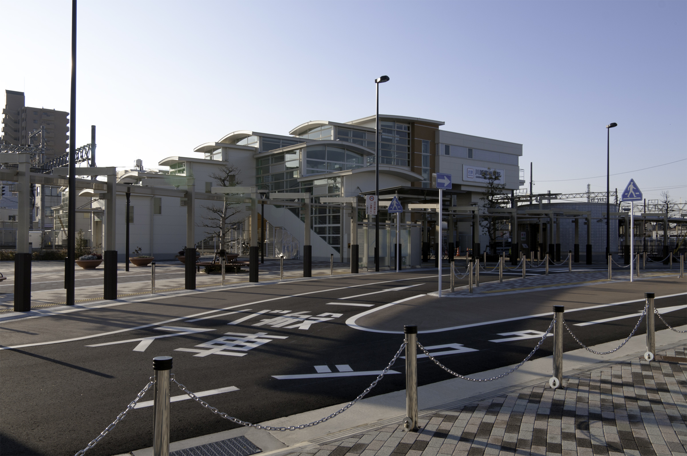 近畿日本鉄道株式会社名古屋線川越富洲原駅駅舎